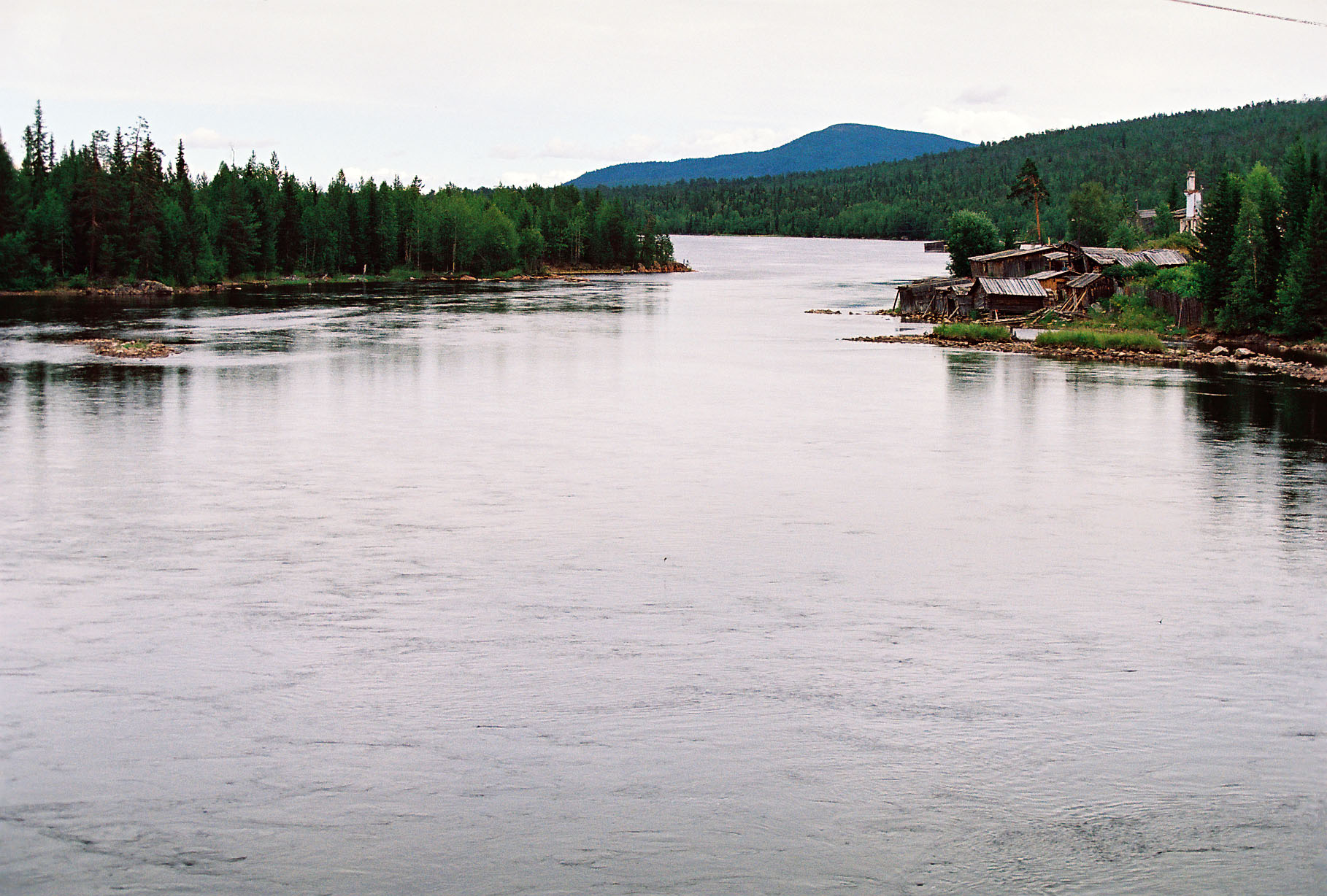 река Иова возле Зареченска